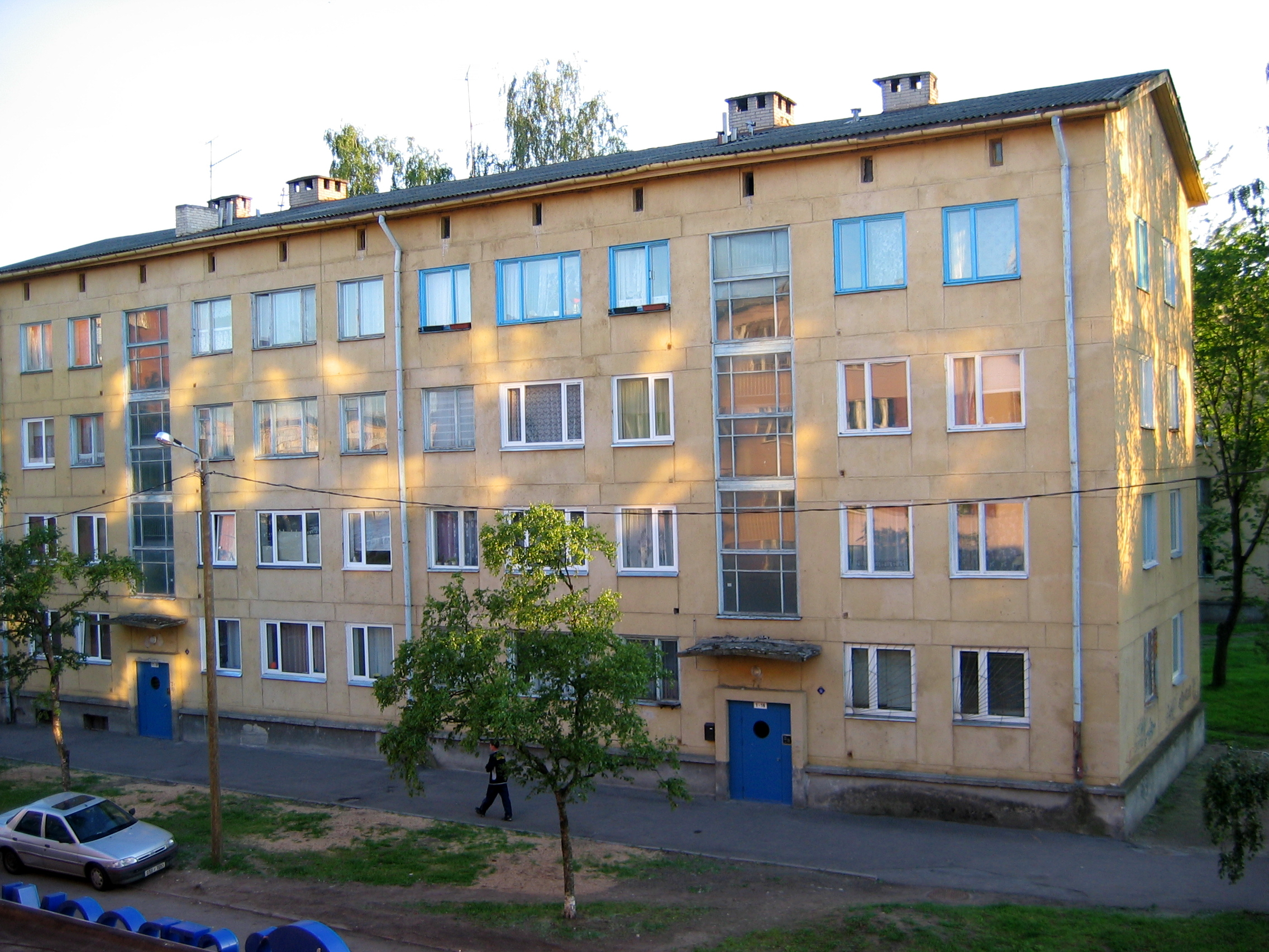 Tallinn Sommer 2007